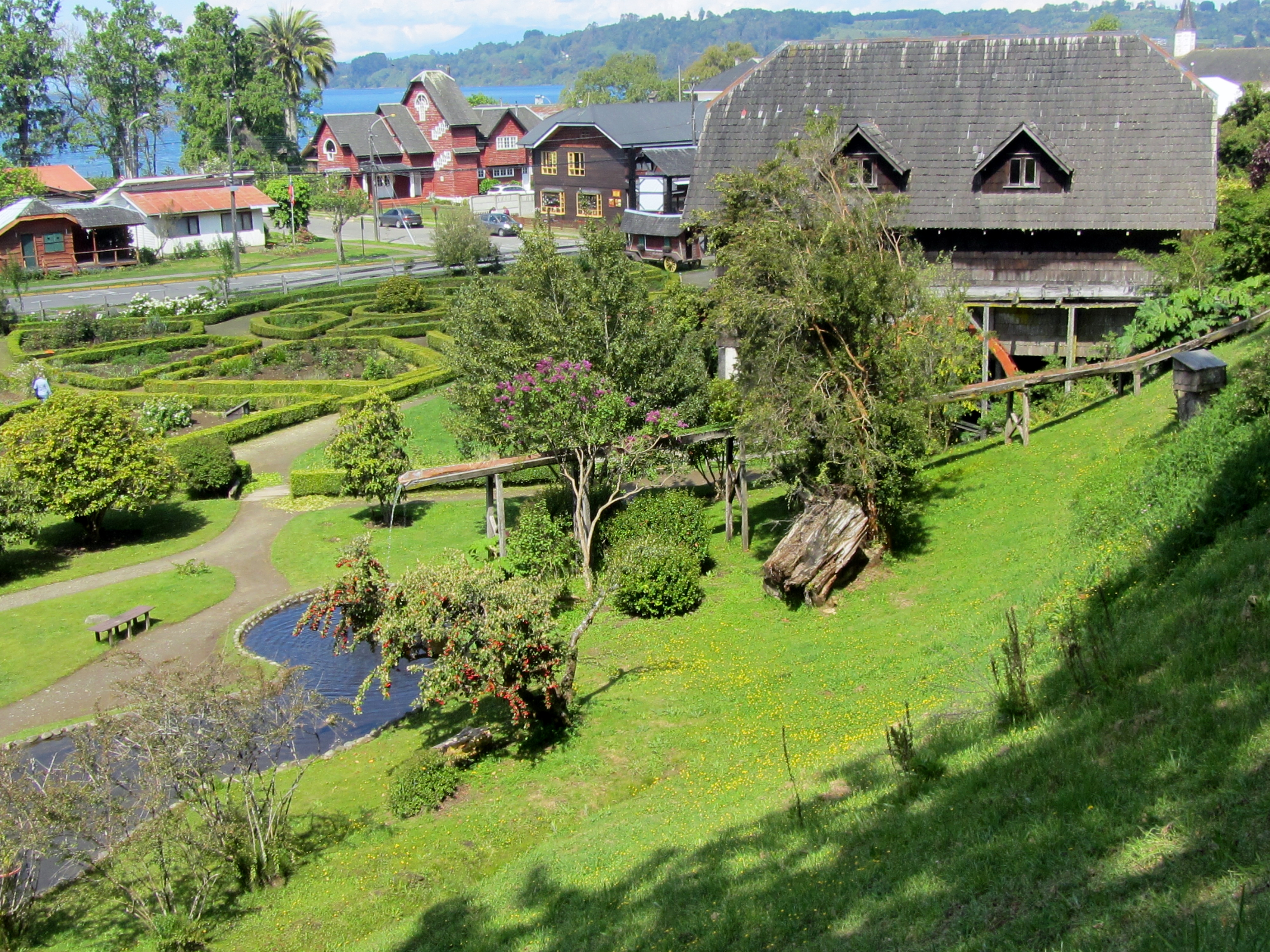 Vista al jardín del Museo Colonial Alemán y a Frutillar, Chile .